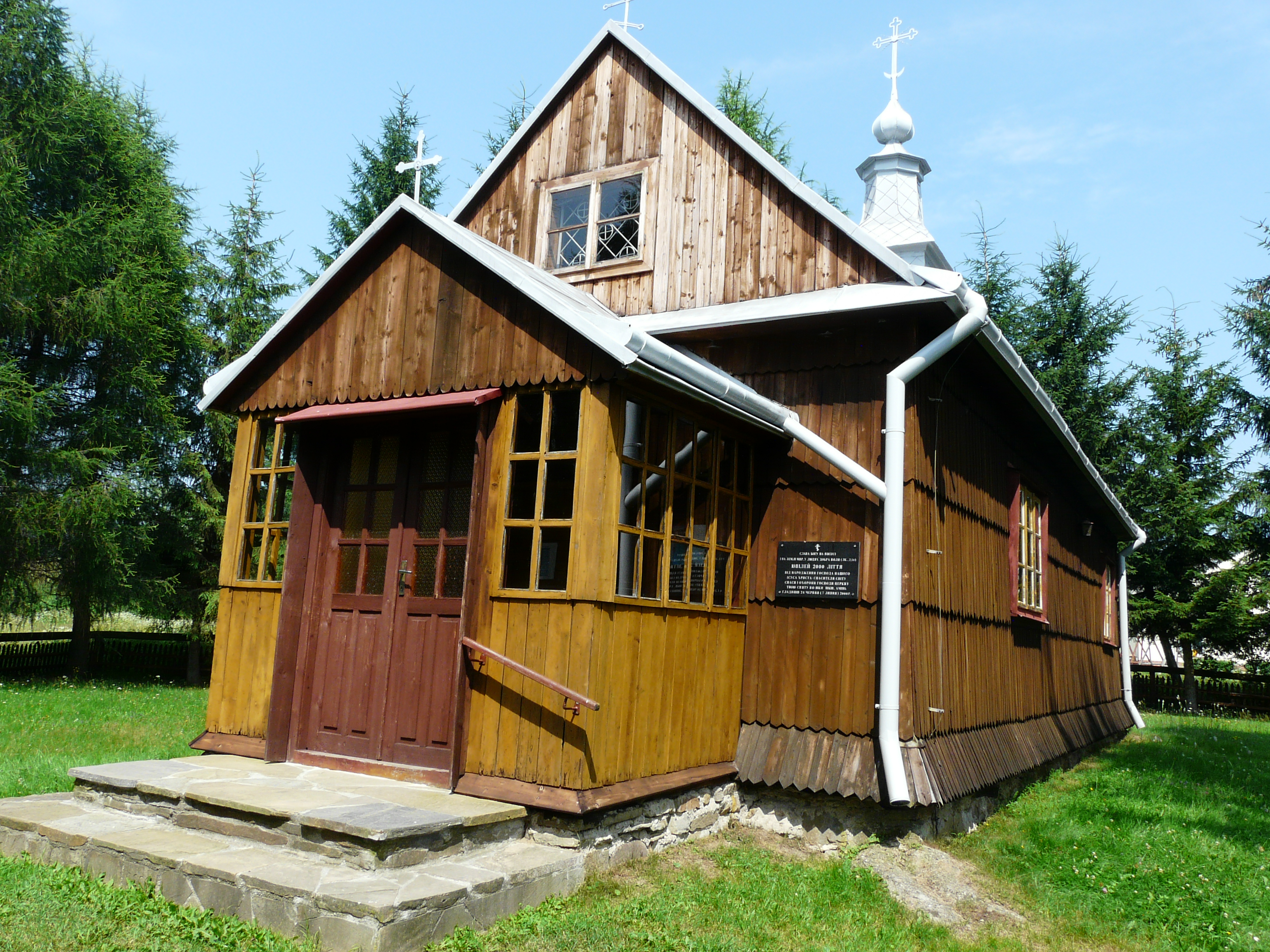 Cerkiew Narodzenia św. Jana Chrzciciela w Gładyszowie